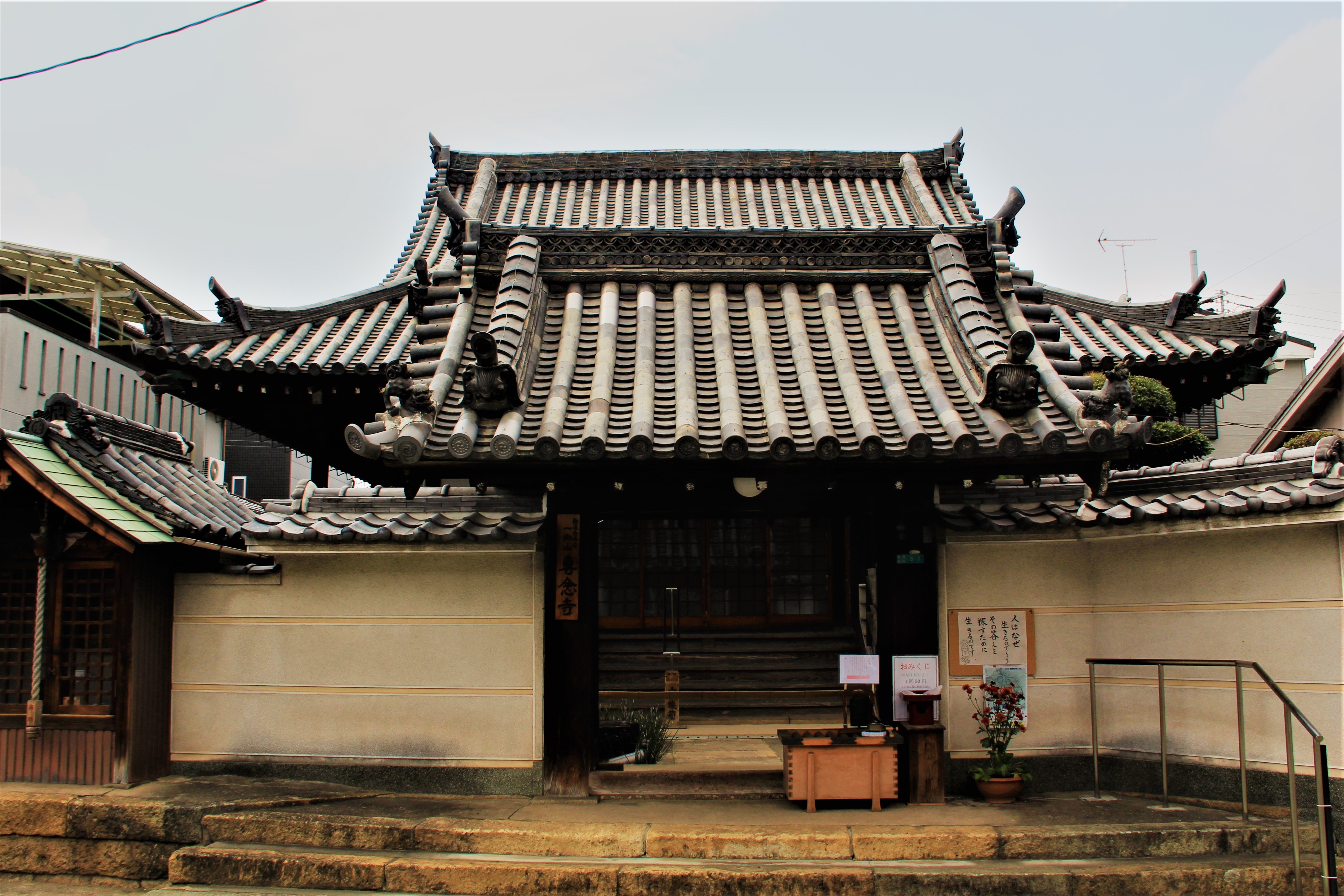 専念寺表門